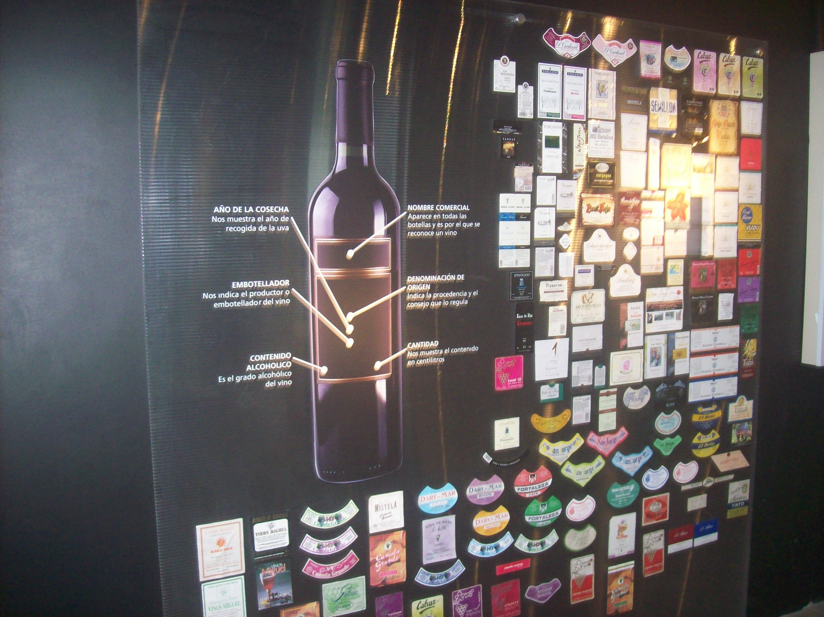 Etiquetas nacionales en el Museo de la Uva y el Vino